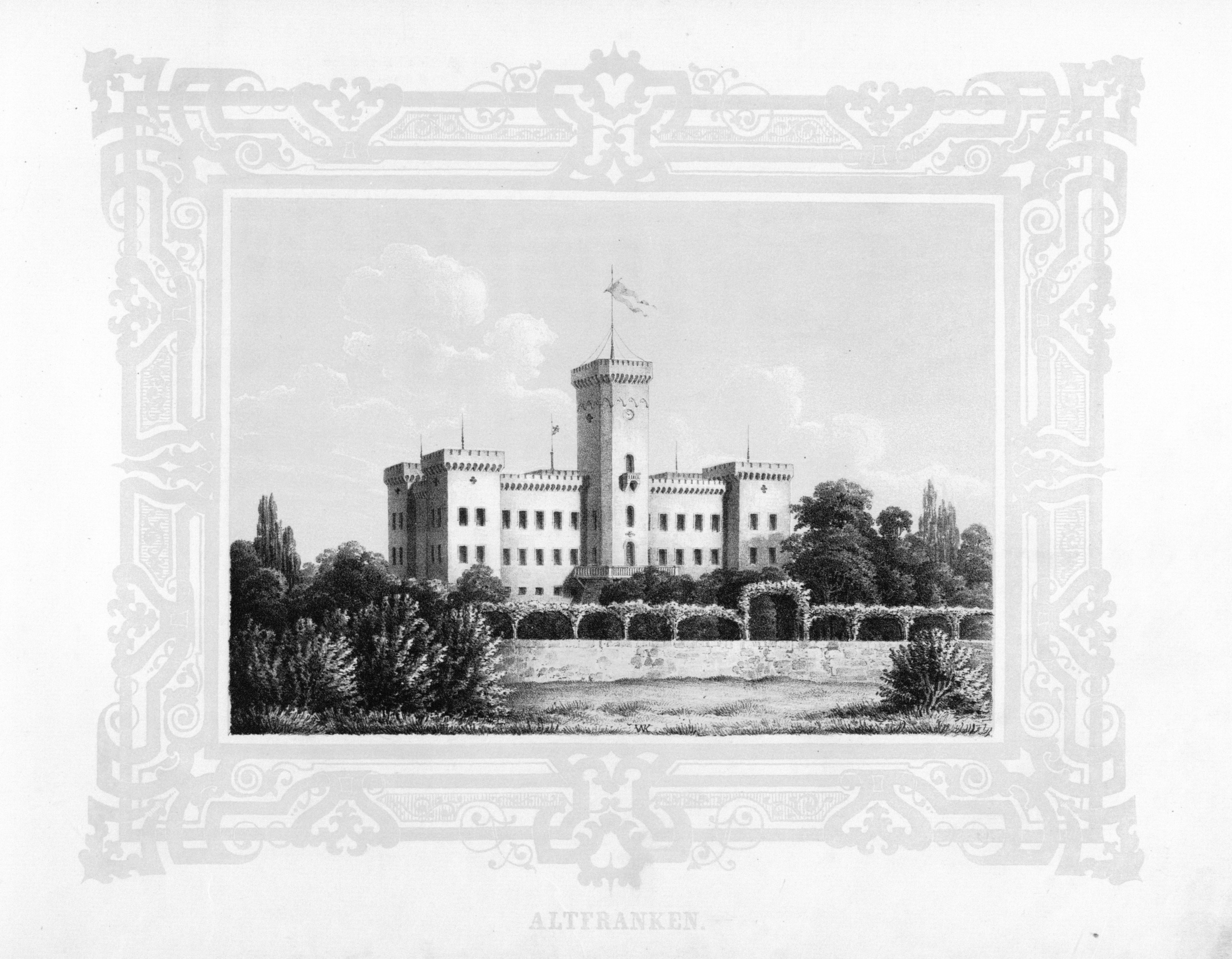 Altfranken aus: Album der Rittergüter und Schlösser im Königreiche Sachsen Meissner Kreis Section: II